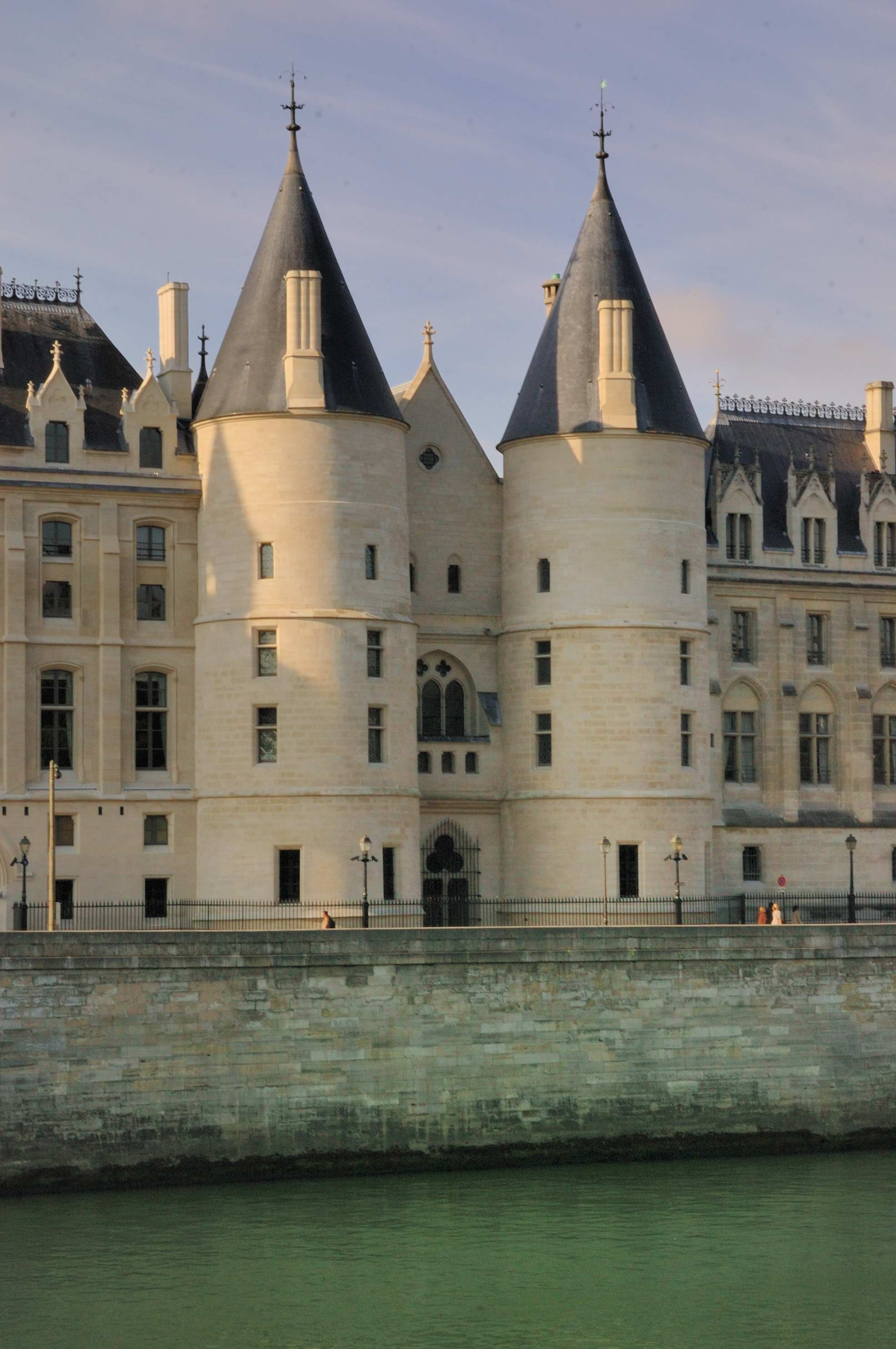 Palais de Concergierie, Paris.